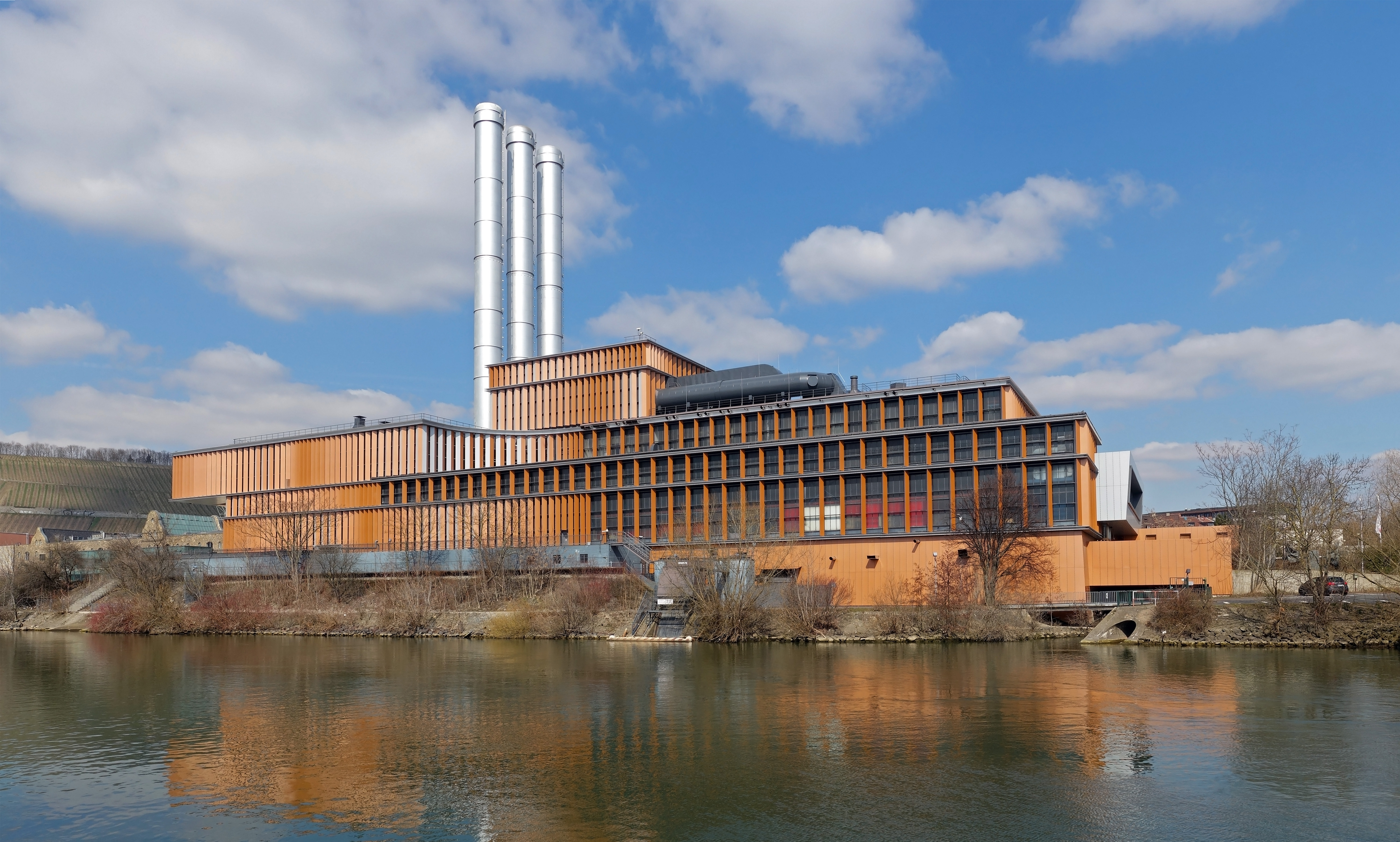 Das Heizkraftwerk Würzburg wurde Anfang der 1950er Jahre ist im Jahre als kohlebefeuertes Kraftwerk errichtet und ab dem Jahre 2003 in ein erdgasgefeuertes GuD-Kraftwerk umgerüstet. Es liegt am Ufer des Mains in Würzburg. Diese Datei wurde mit Hugin erstellt.